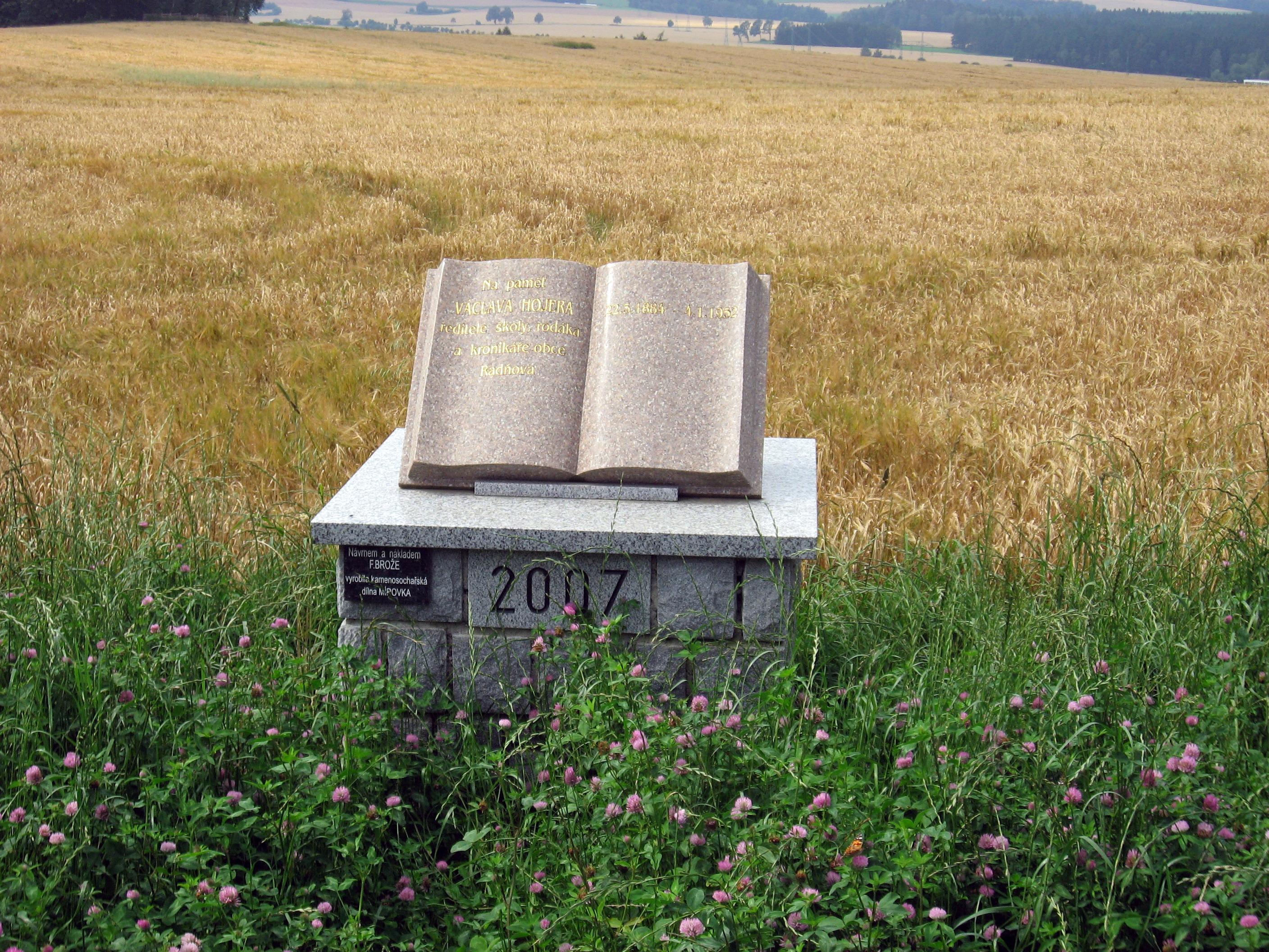 Radňov, památník